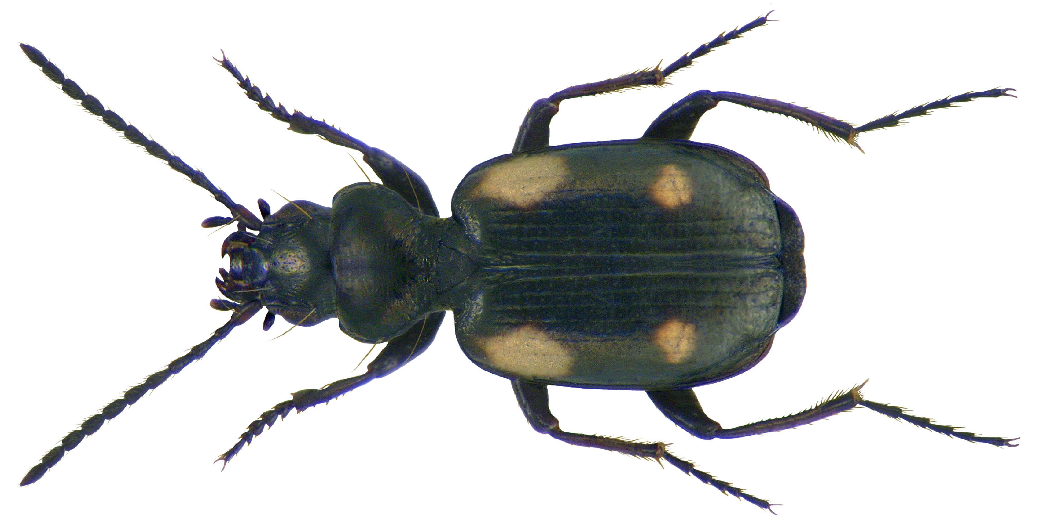 Familie: Carabidae Grösse: 2,8-3,5 mm Verbreitung: Europa (ohne Skandinavien, Wesrfrankreich und Teile der Iberischen Halbinsel) bis zum Kaukasus Ökologie: vor allem an kiesigen Bachufern, wärmeliebend Fundort: England, Seaton leg.det. J.M.Walters, 2004 Foto: U.Schmidt, 2009